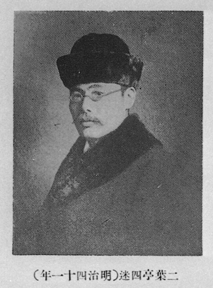 Portrait of Futabatei Shimei (二葉亭四迷, 1864 – 1909)